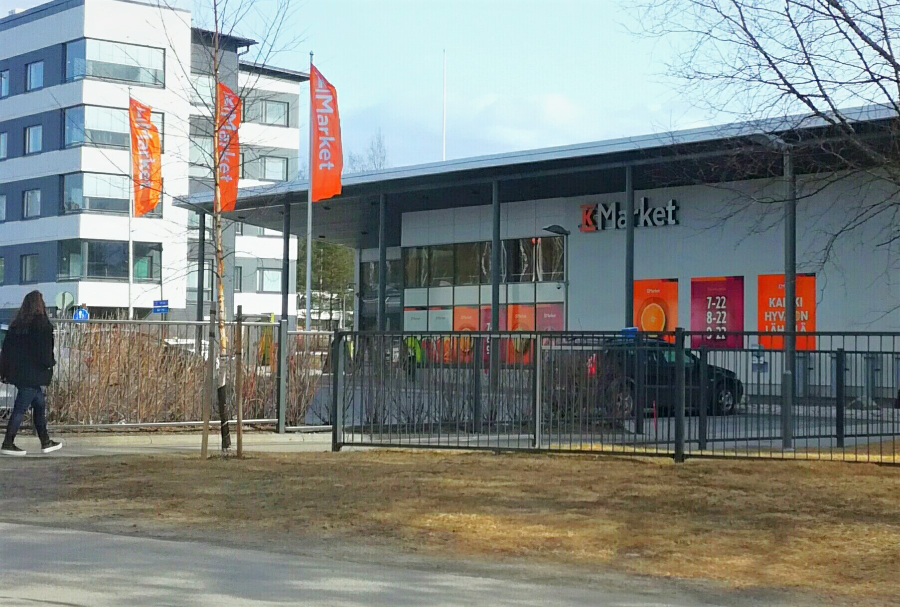 K-Market Jyväskylässä Lohikosken kaupunginosassa.